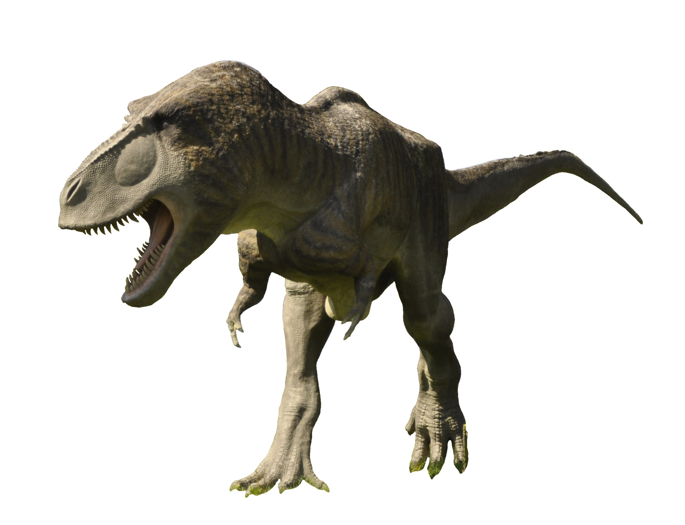 JuraPark Bałtów - Tyrannosaurus